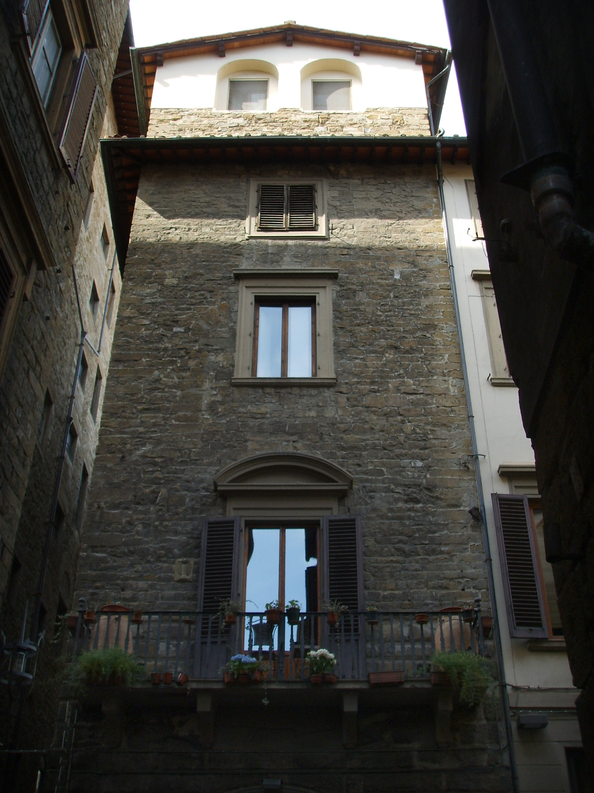 Torre dei ghiberti 02